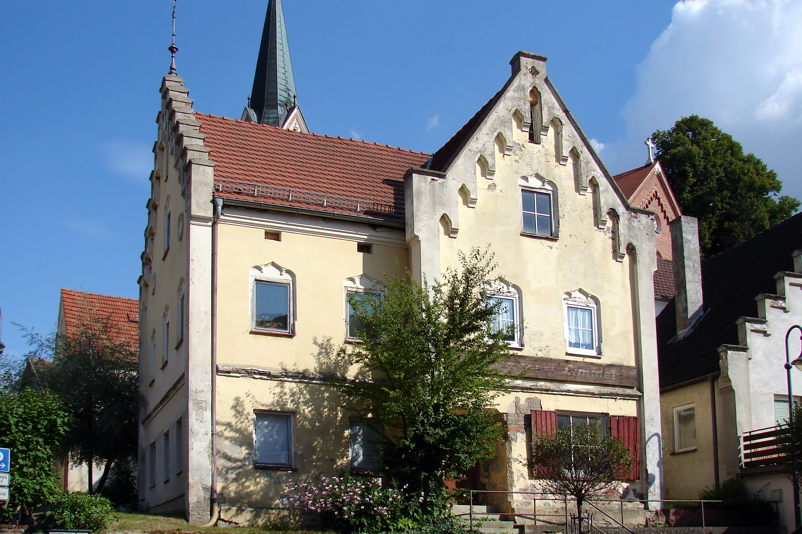 Wohn- und Geschäftshaus mit Treppengiebel, Zwerchhaus und Maßwerkgliederung, um 1880.